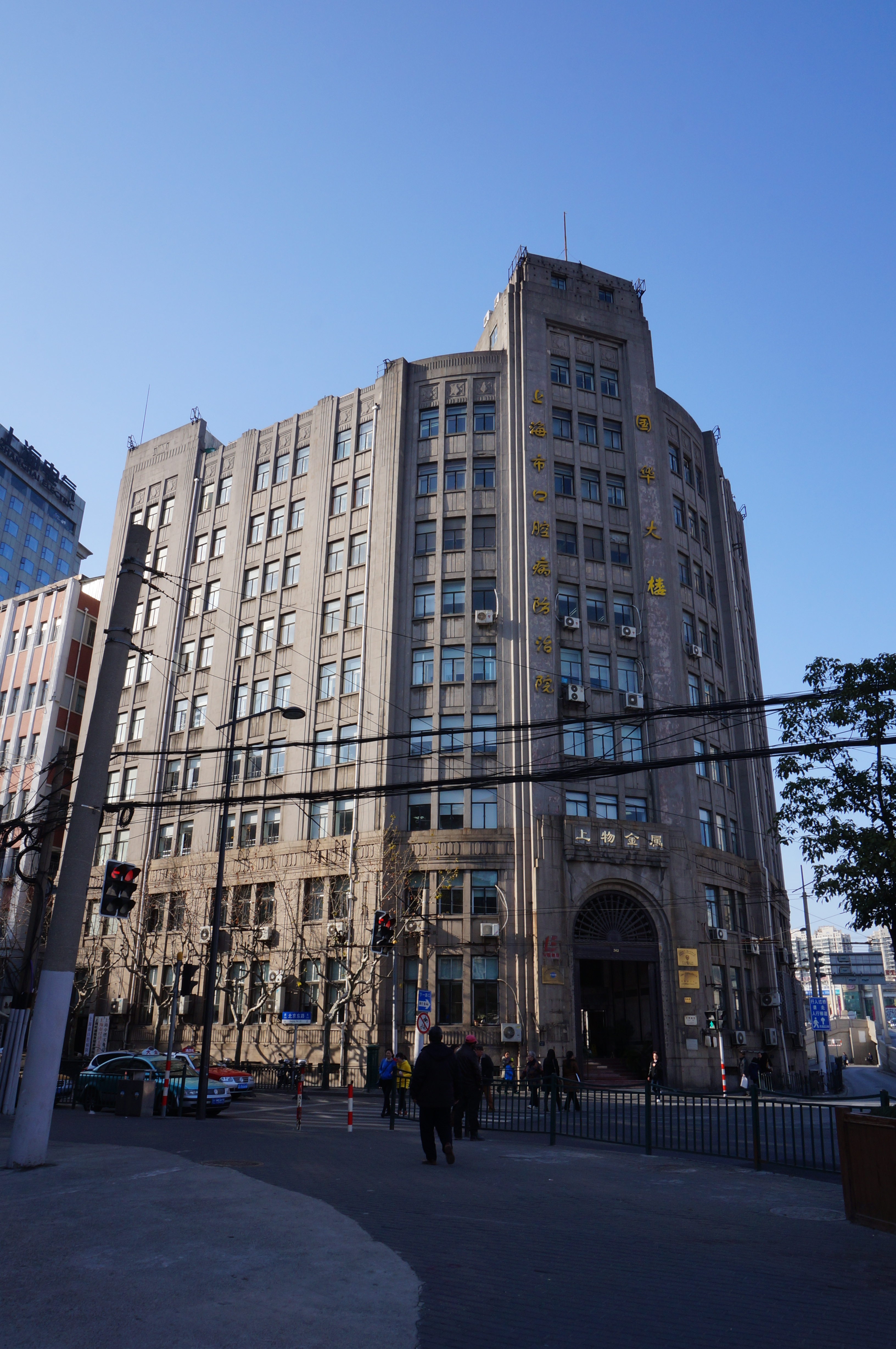 中文（中国大陆）: 上海第二批优秀历史建筑——国华银行大楼